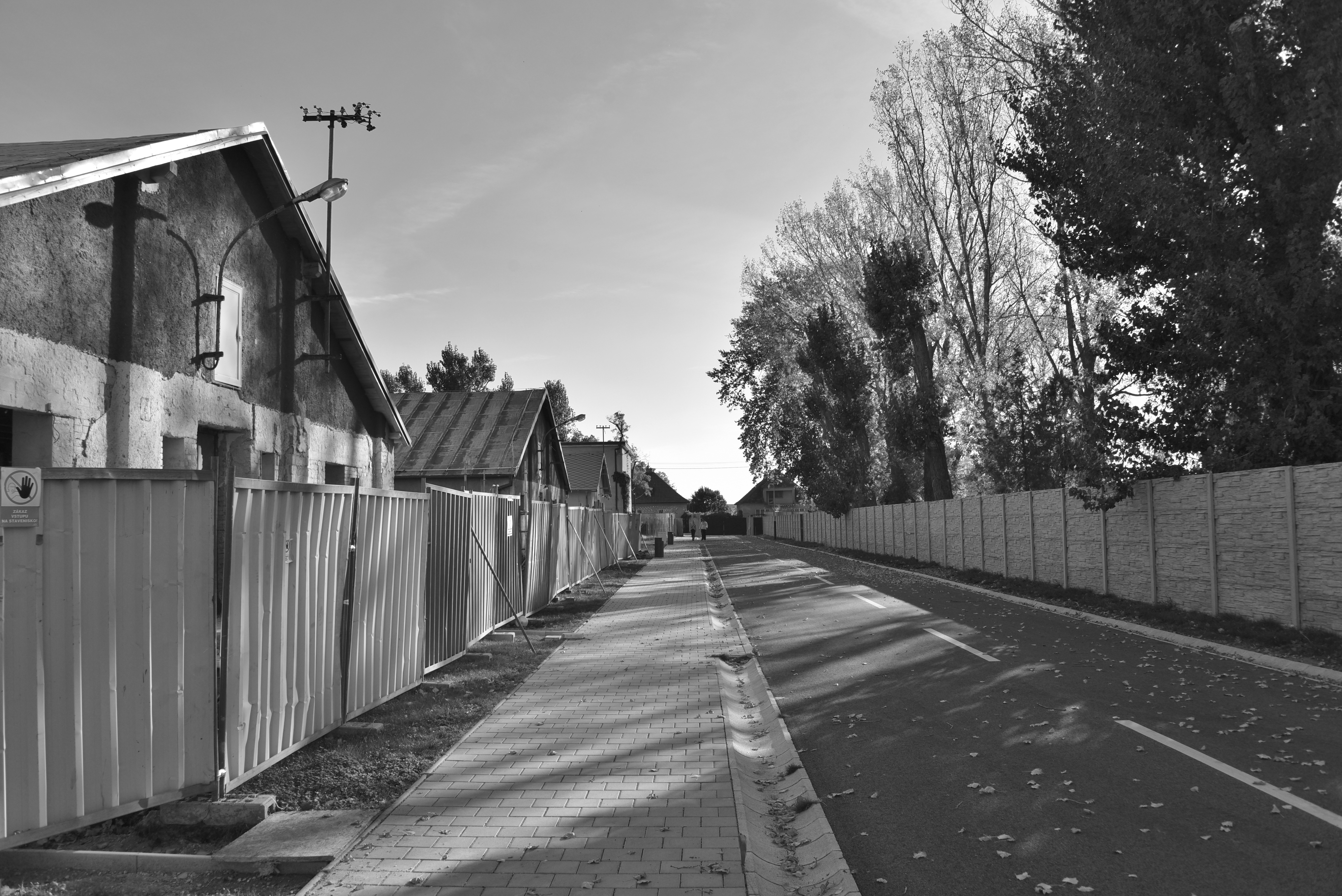 KZ Sereď